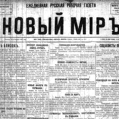 Новый Мир (Novy Mir) - газета, Нью-Йорк, 1916-1917. В редколлегию входил Л. Д. Троцкий